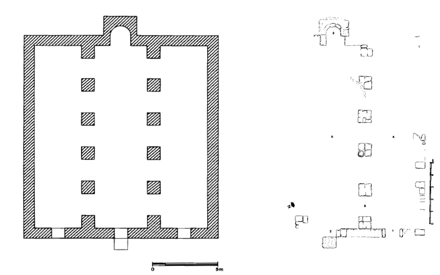 A la izquierda: Planta de la basílica clásica, con sus tres naves separadas por pilares, y la exedra en el extremo oriental. A la derecha: Boceto de las ruinas de la basílica exhumadas en 1971 durante la serie de excavaciones.